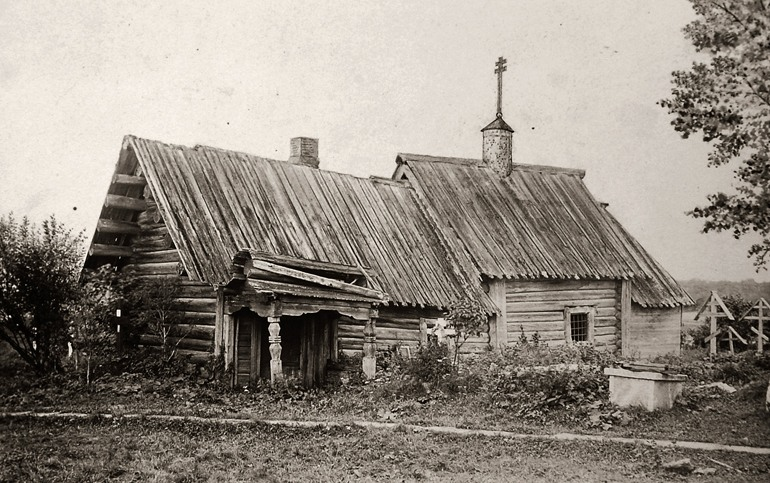 Церковь Святого Димитрия Солунского, южный фасад, фото 1880-е гг.